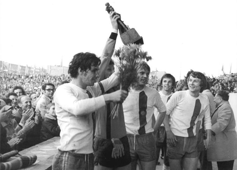 ADN-ZB-Mittelstädt-1.5.76-ma-Berlin: 25.Finale FDGB-Pokal im Fußball.1.FC Lok Leipzig-FC Vorwärts Frankfurt (Oder) 3: 0-Beifall für den neuen Pokalsieger.V.l.n.r.: ein Teil der Leipziger Mannschaft mit dem wertvollen FDGB-Pokal: Mannschaftskapitän Hammer und Wilfried Gröbner.